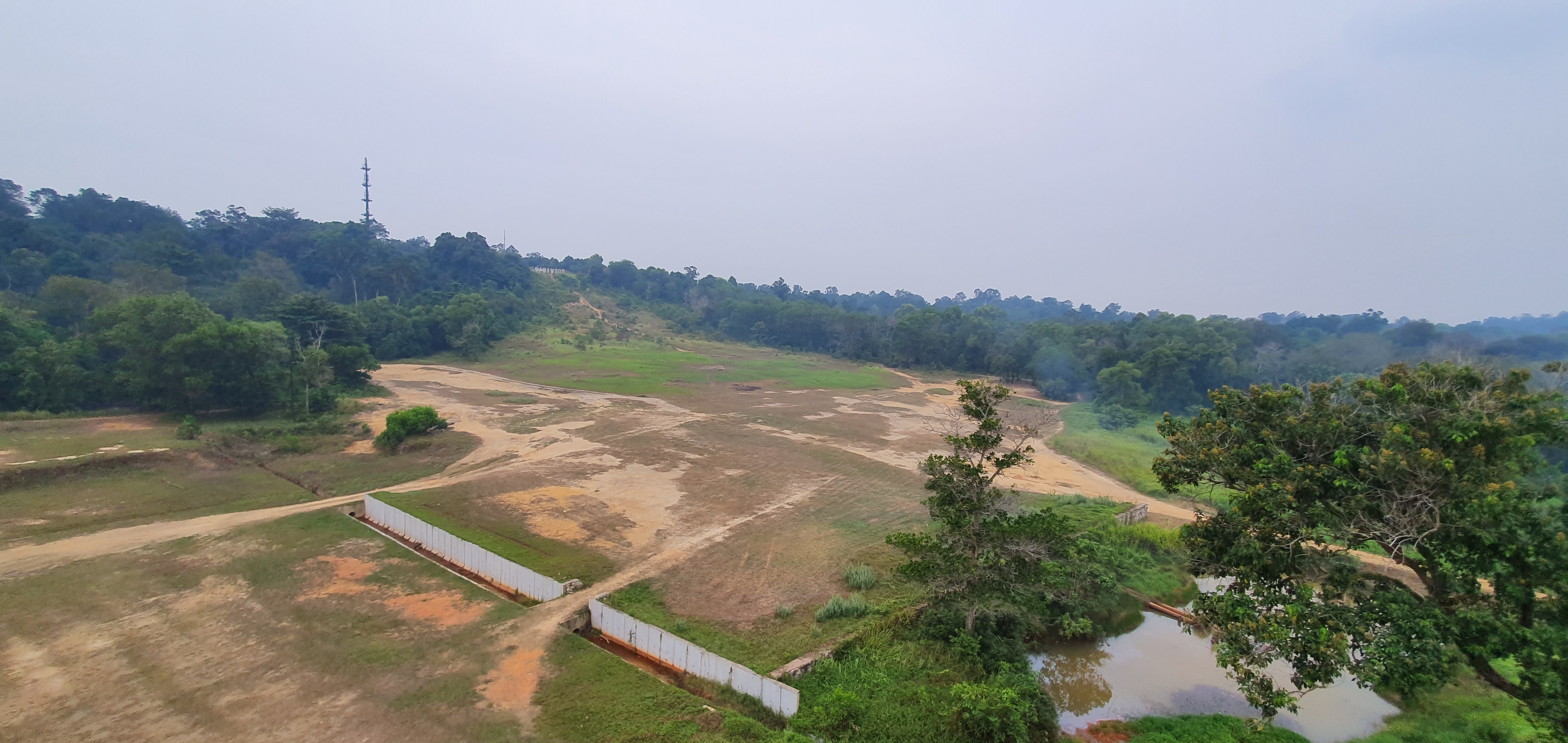 Zon gugur Syed Sirajuddin